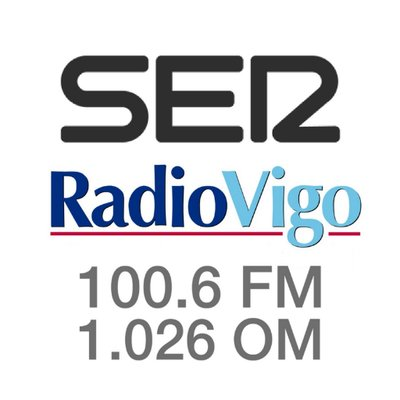 logo radio vigo